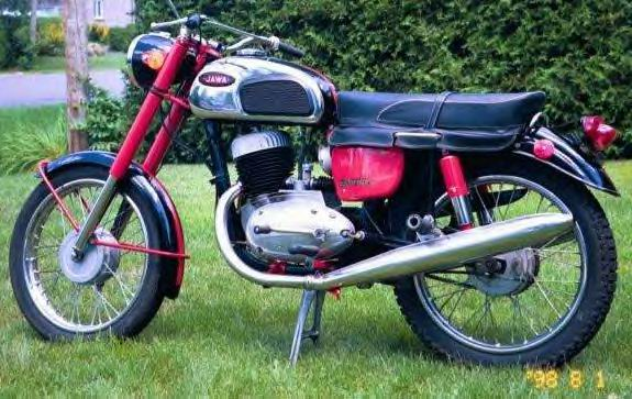 Jawa Californian 350 aus den 70er Jahren Freie Lizenz ( GNU FDL)